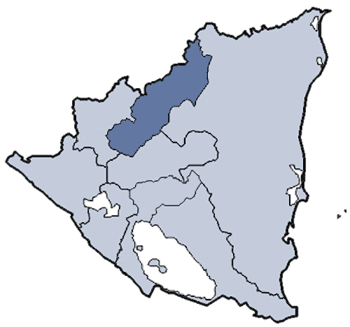 Mappa della diocesi cattolica di Jinotega, in Nicaragua. Lavoro personale eseguito a partire da questa immagine di Commons. Fonte per i confini delle diocesi: Categoria:Chiesa cattolica in Nicaragua